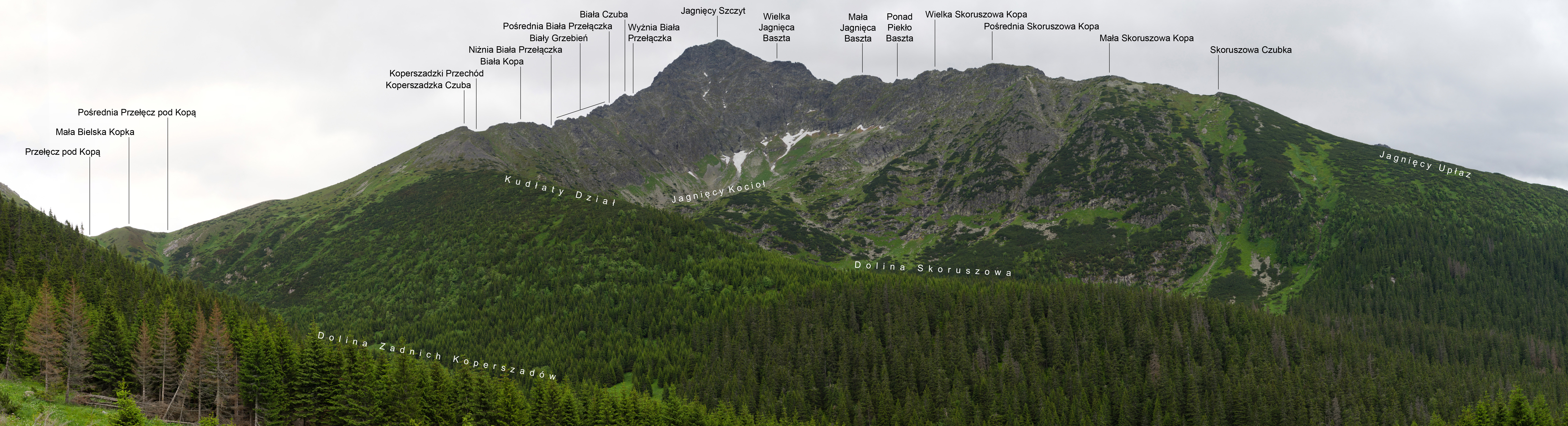 Jagnięcy Szczyt i jego dwie granie (Koperszadzka i Jagnięca) – widok z Doliny Zadnich Koperszadów, z podpisami.